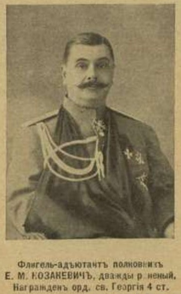 флигель-адъютант Евгений Михайлович Казакевич в 1915 году.